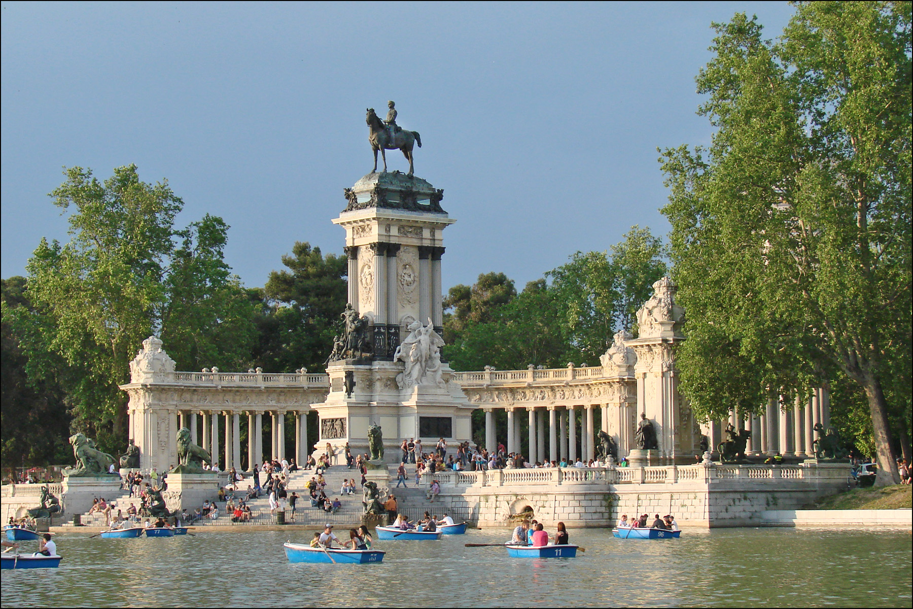 Le monument à Alphonse XII domine le grand bassin dans le parc du Retiro. C'est un lieu de détente des madrlènes situé en plein centre-ville. Le parc date de 1631, il était destiné au Roi d'Espagne et comprenait de nombreux bâtiments aujourd'hui détruits.